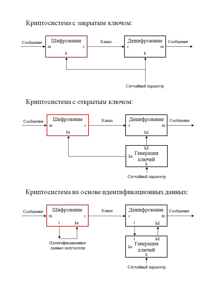 Личностное шифрование. Различия между схемой с закрытым, открытым ключом и личностным шифрованием